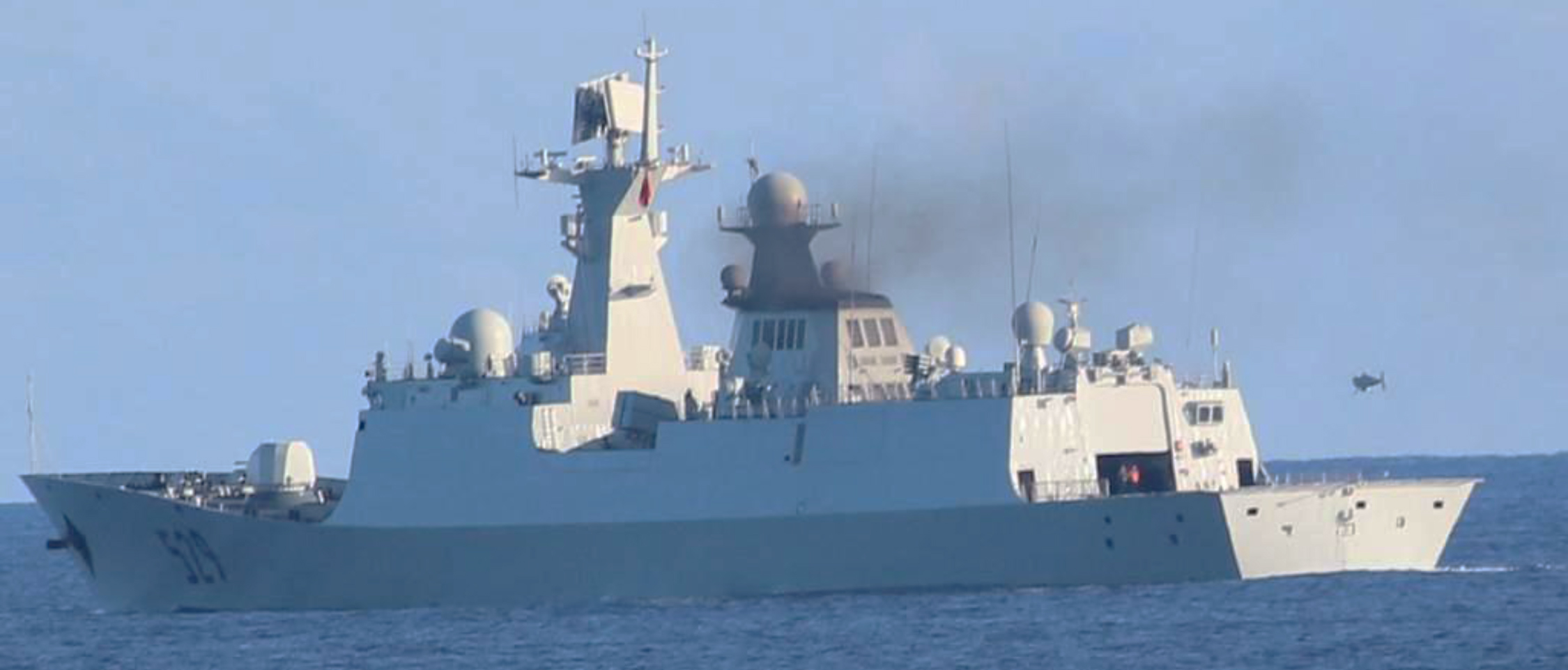 ５月１４日（月）午後２３時頃から午後２４時頃にかけて、海上自衛隊第５航空群（那覇）所属「Ｐ－３Ｃ」、第６護衛隊「たかなみ」（横須賀）及び第１５護衛隊「はまぎり」（大湊）が、宮古島の北東約１１０ｋｍの海域を太平洋から東シナ海に向けて北西進する中国海軍ジャンカイⅡ級フリゲート２隻及びドンディアオ級情報収集艦１隻を確認した。 なお、これら３隻の艦艇は、４月２９日（日）正午頃、屋久島の西約４３０ｋｍの海域を東シナ海から太平洋に向けて東進し、その後、沖ノ鳥島東約７００ｋｍの海域において無人航空機の飛行訓練を行っていたことが確認されている。